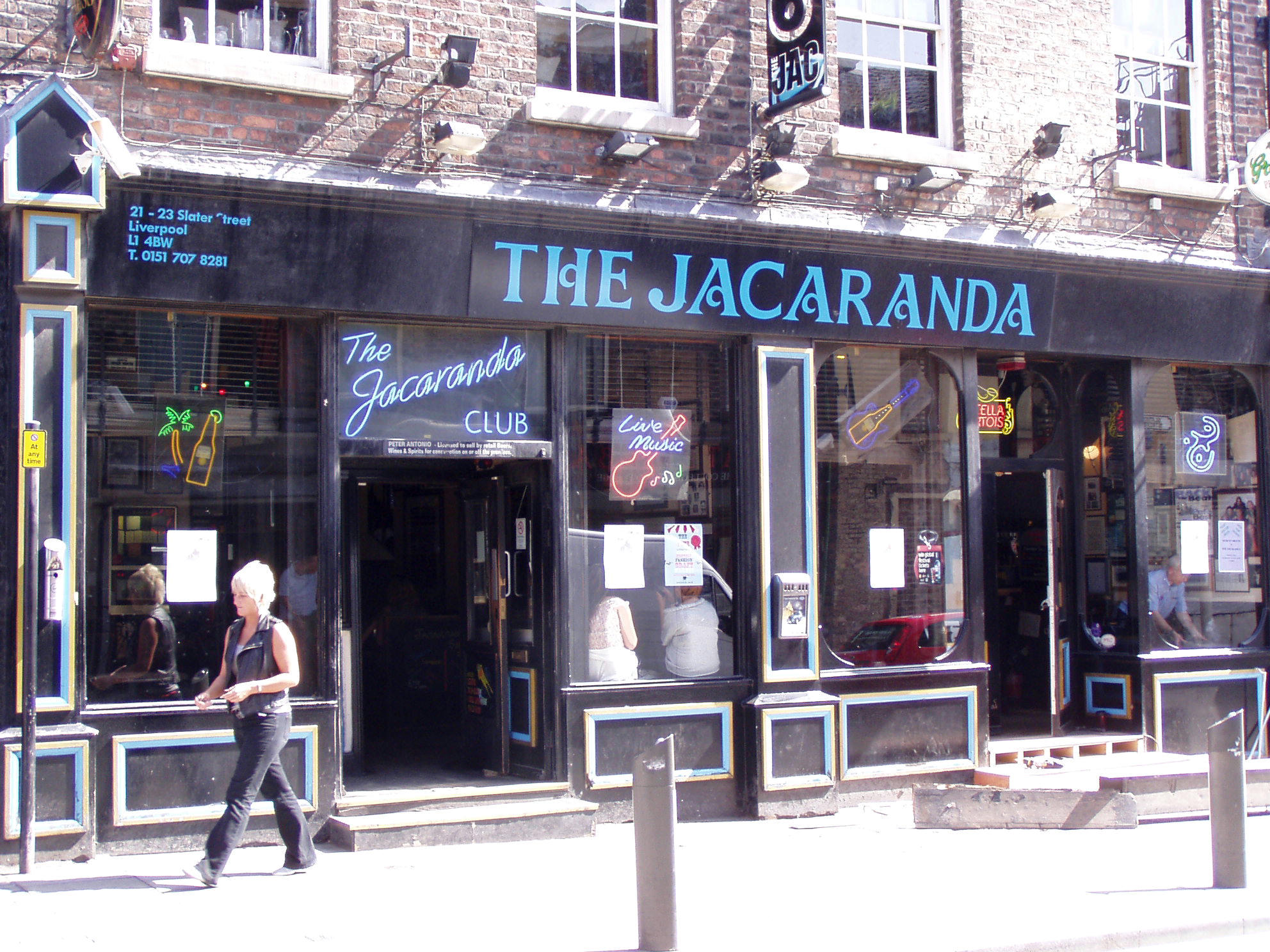 The Jakaranda Bar, Liverpool